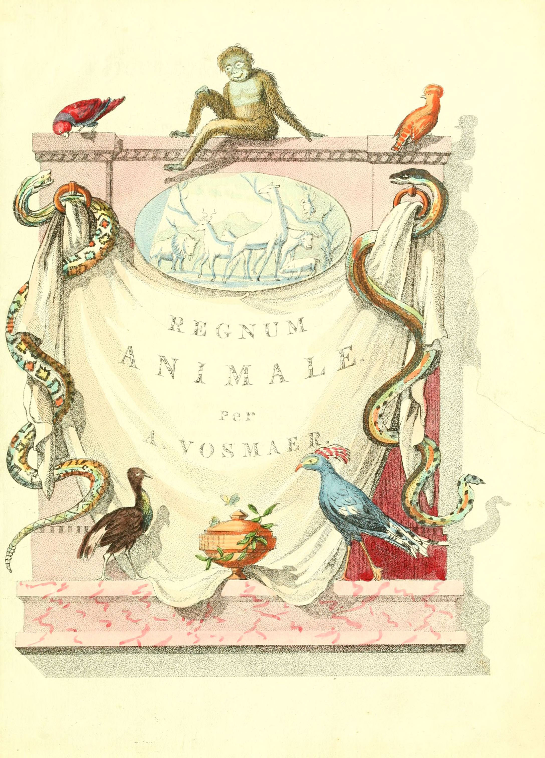 Natuurkundige beschryving eener uitmuntende verzameling van zeldsaame gedierten : bestaande in Oost- en Westindische viervoetige dieren, vogelen en slangen : weleer leevend voorhanden geweest zynde, buiten den Haag, op het Kleine Loo van Z.D.H. den Prins van Oranje-Nassau / door A. Vosmaer ; met naar 't leven Getekende en Gecouleurde Afbeeldingen.